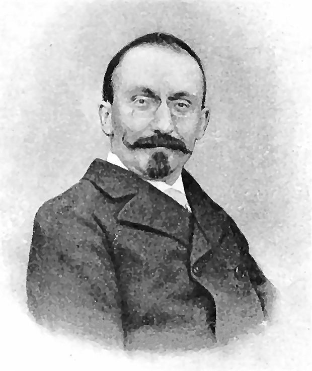 ce fichier était sur